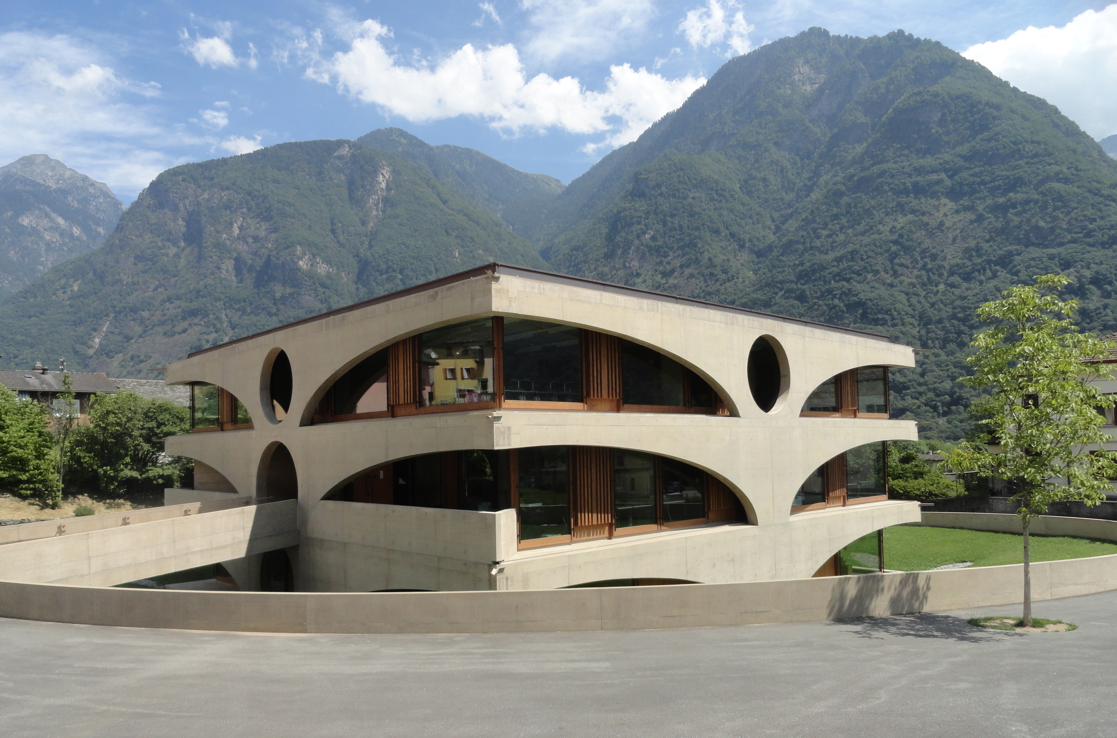 Schulhaus Grono, Architekten Raphael Zuber und David Gianinazzi, erbaut 2011